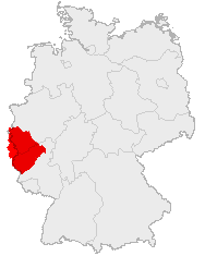 Lage und Ausdehnung der Eifel